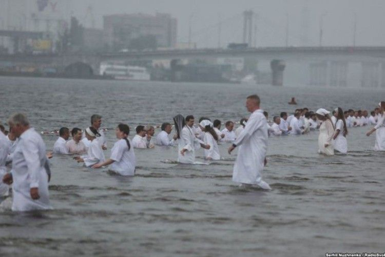 500 вірян одночасно прийняли хрещення у водах Дніпра 22 липня 2018 року, у Києві, з нагоди святкування 1030-річчя Хрищення Київської Русі-України Фото